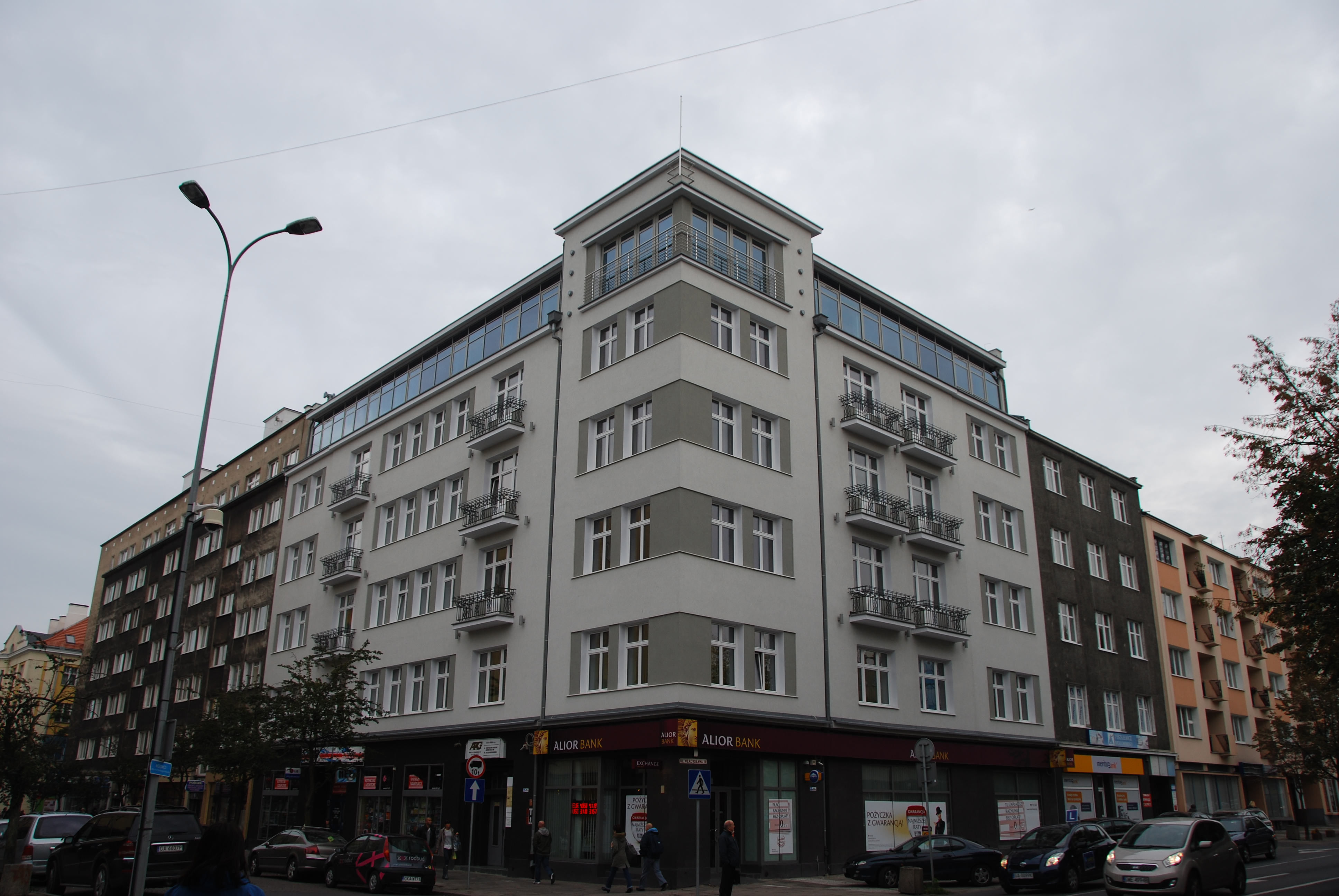 Narożna, czteropiętrowa wczesnofunkcjonalna kamienica Teodora Górskiego, projektu Brunona Kowalskiego, 1931 rok. Gdynia, ul. Starowiejska 17.